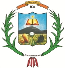 Escudo Oficial